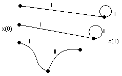 Sterowanie sinusoidalne dla układów jednołańcuchowych